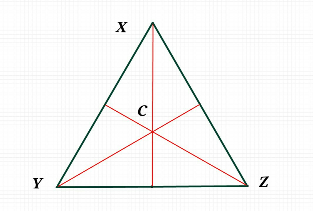 একটি সমবাহু ত্রিভুজের বাহ তিনটি যেমন সমান হয় তেমনি এর কোণ তিনটিও সমান হবে। সমবাহু ত্রিভুজে প্রতিটি কোণের মান ৬০°।